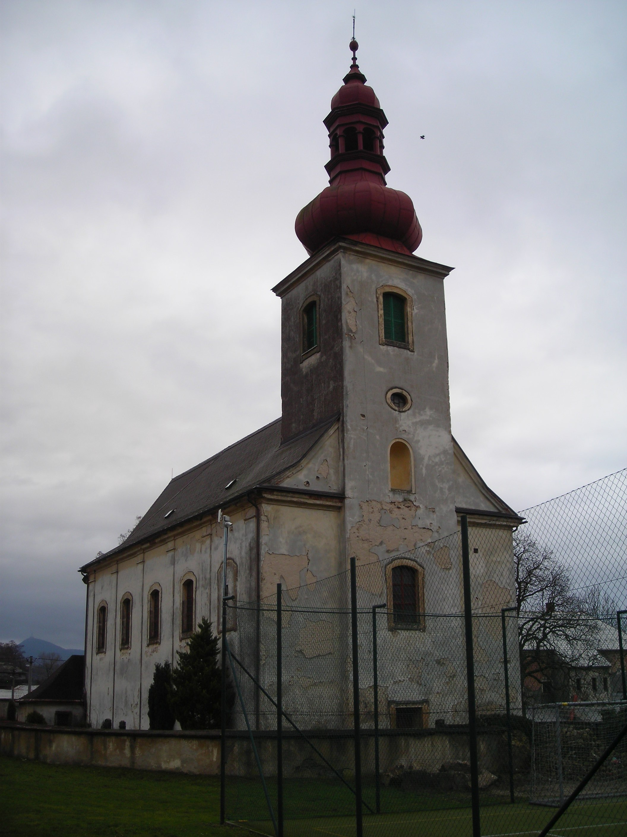 Kostel svatého Jana Křtitele, Zdislava.